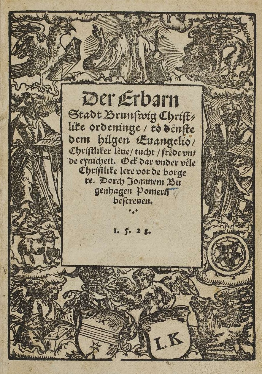 Titelblatt der Braunschweiger Kirchenordnung "Der erbarn Stadt Brunswig christlike Ordening to Denste dem hilgen Evangelio ... / dorch Johannem Bugenhagen ... bescreven." Wittenberg 1528